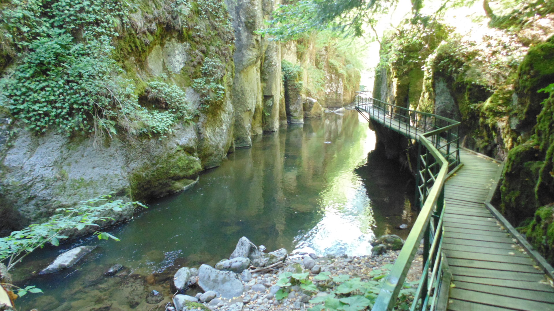 Защитена местност Поречието на река Девинска